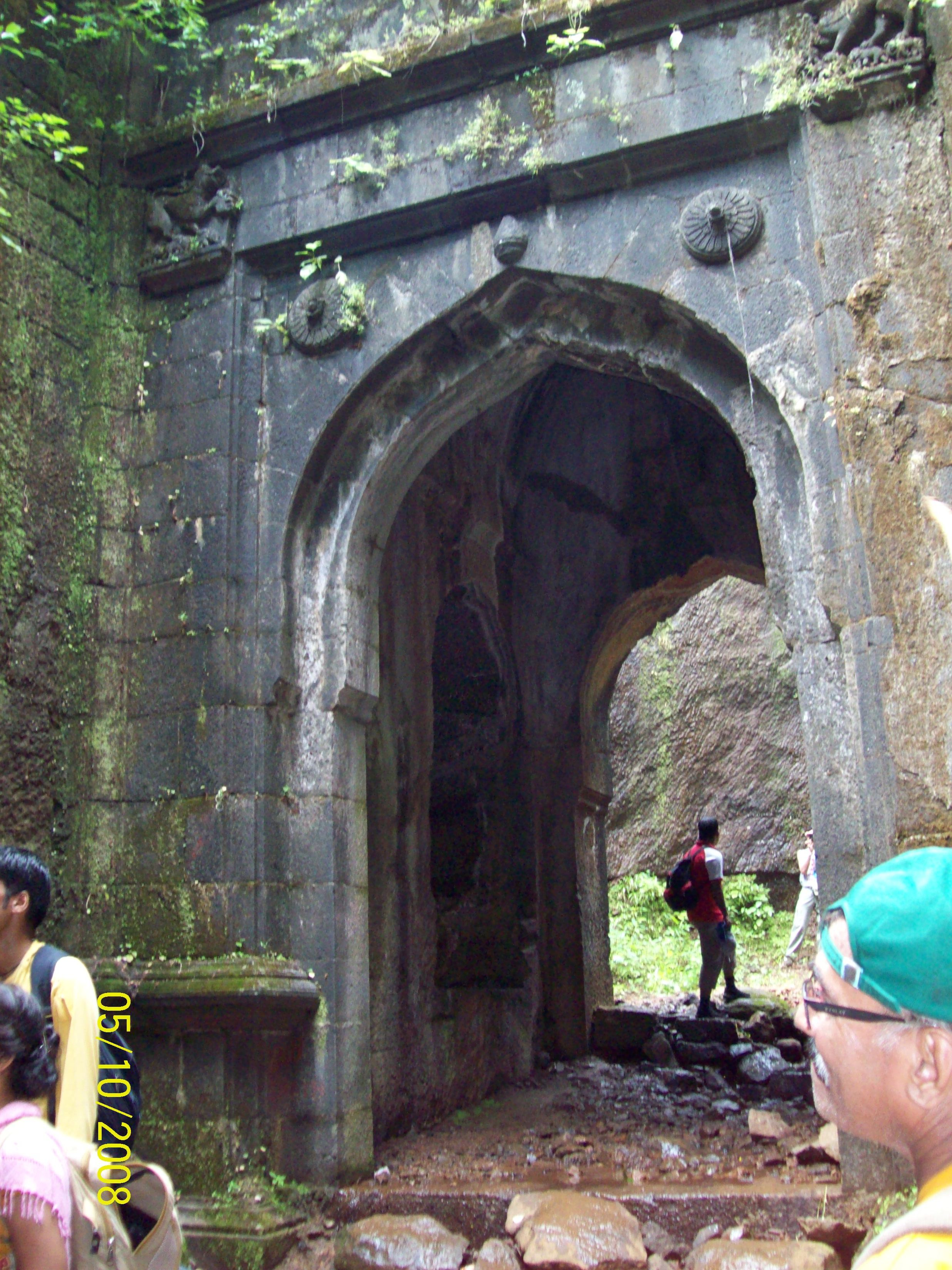 Sudhagad entrance